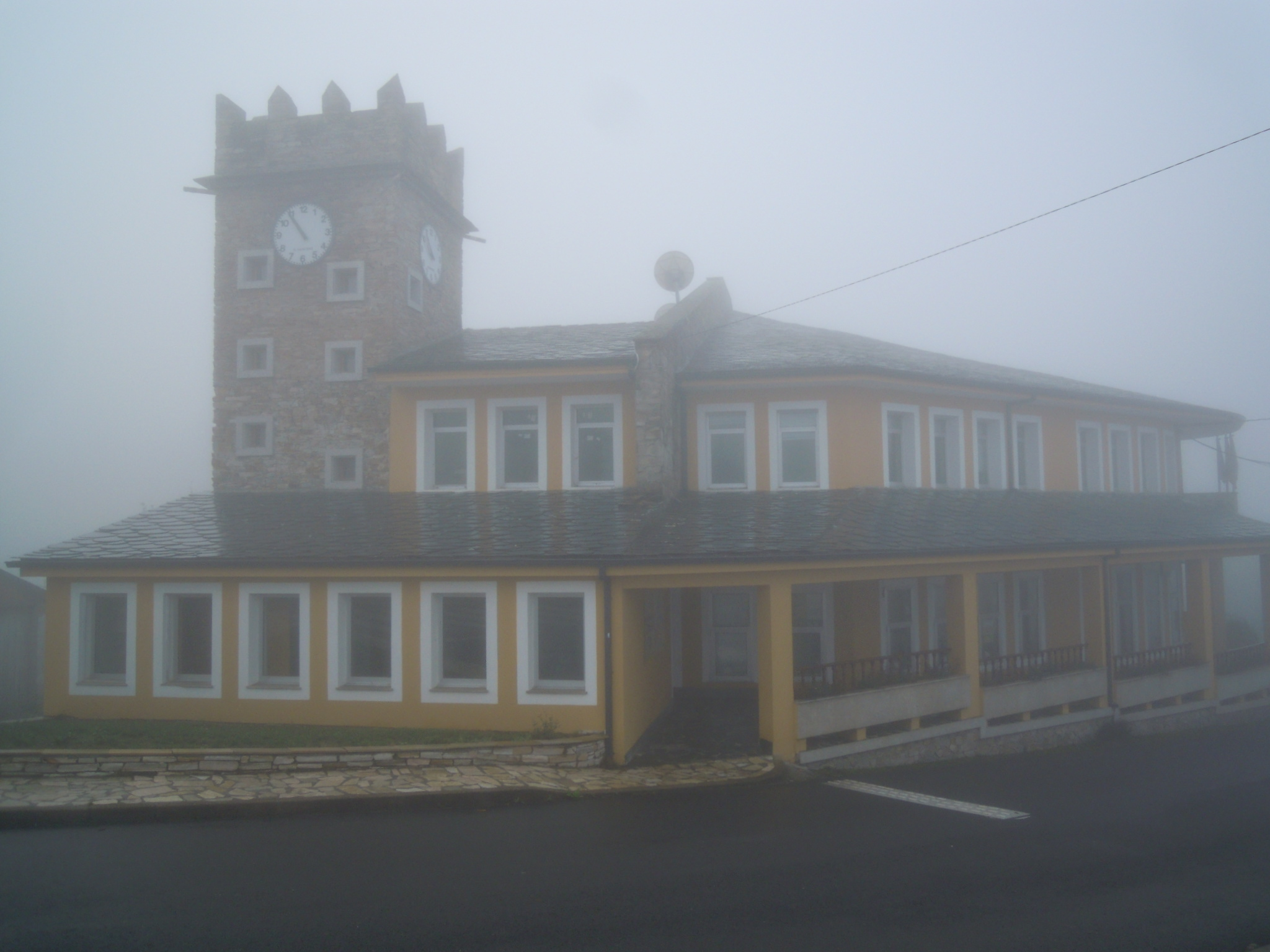 Casa consistorial de Cervantes nunha mañá de néboa